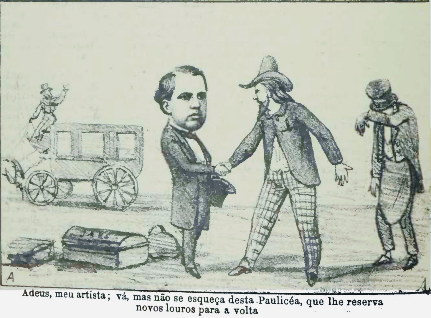 Após temporada em São Paulo, o ator Joaquim Augusto se despede da cidade. O periódico "O Cabrião" presta homenagem ao ator, figura importante na revitalização da atividade teatral paulistana.